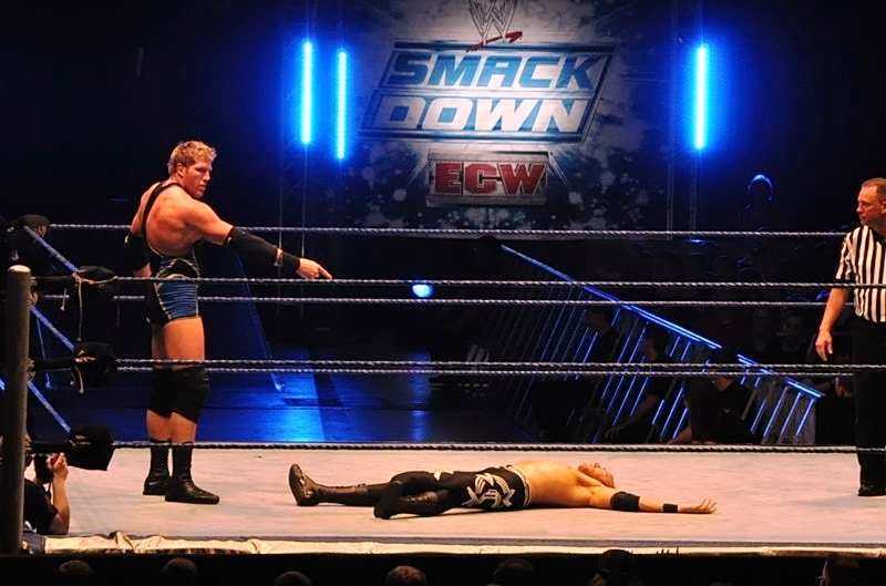 wwe wreslters